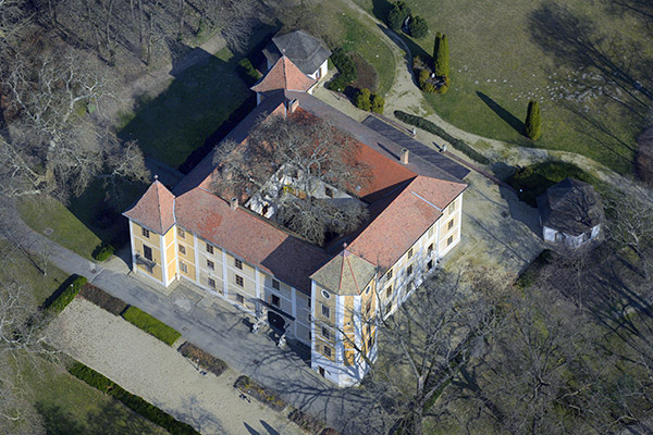 Hédervári kastély, légi fotó